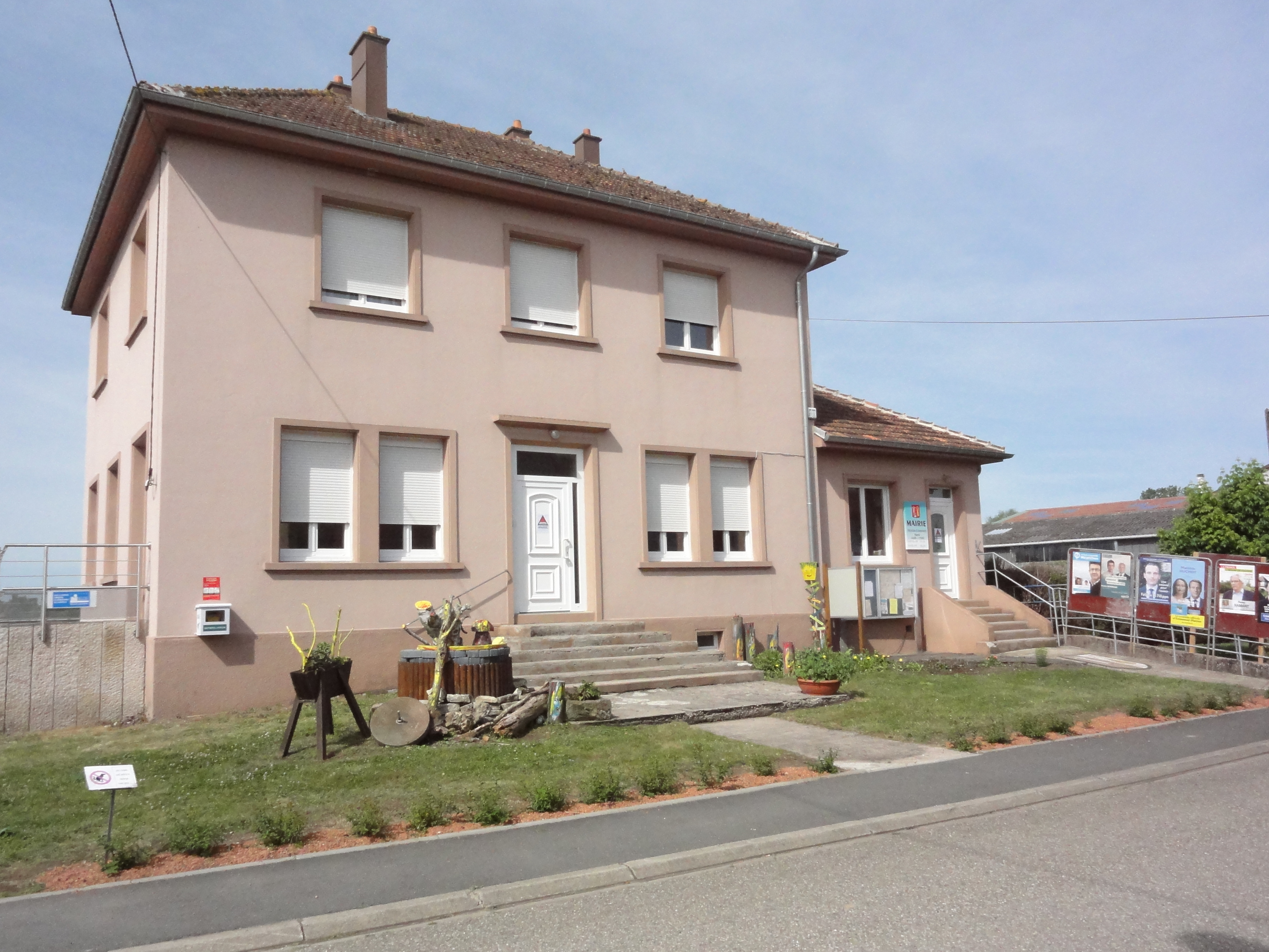 Rhodes (Moselle) mairie